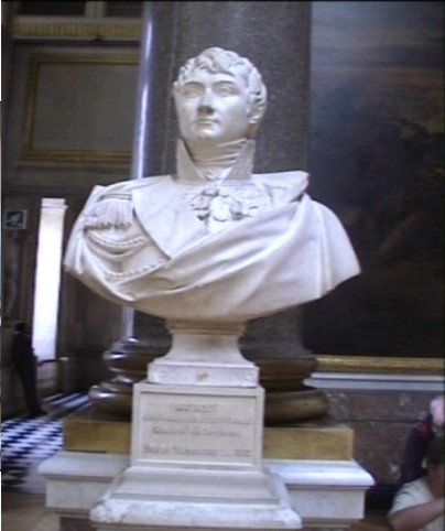 buste de la galerie des batailles du château de Versailles